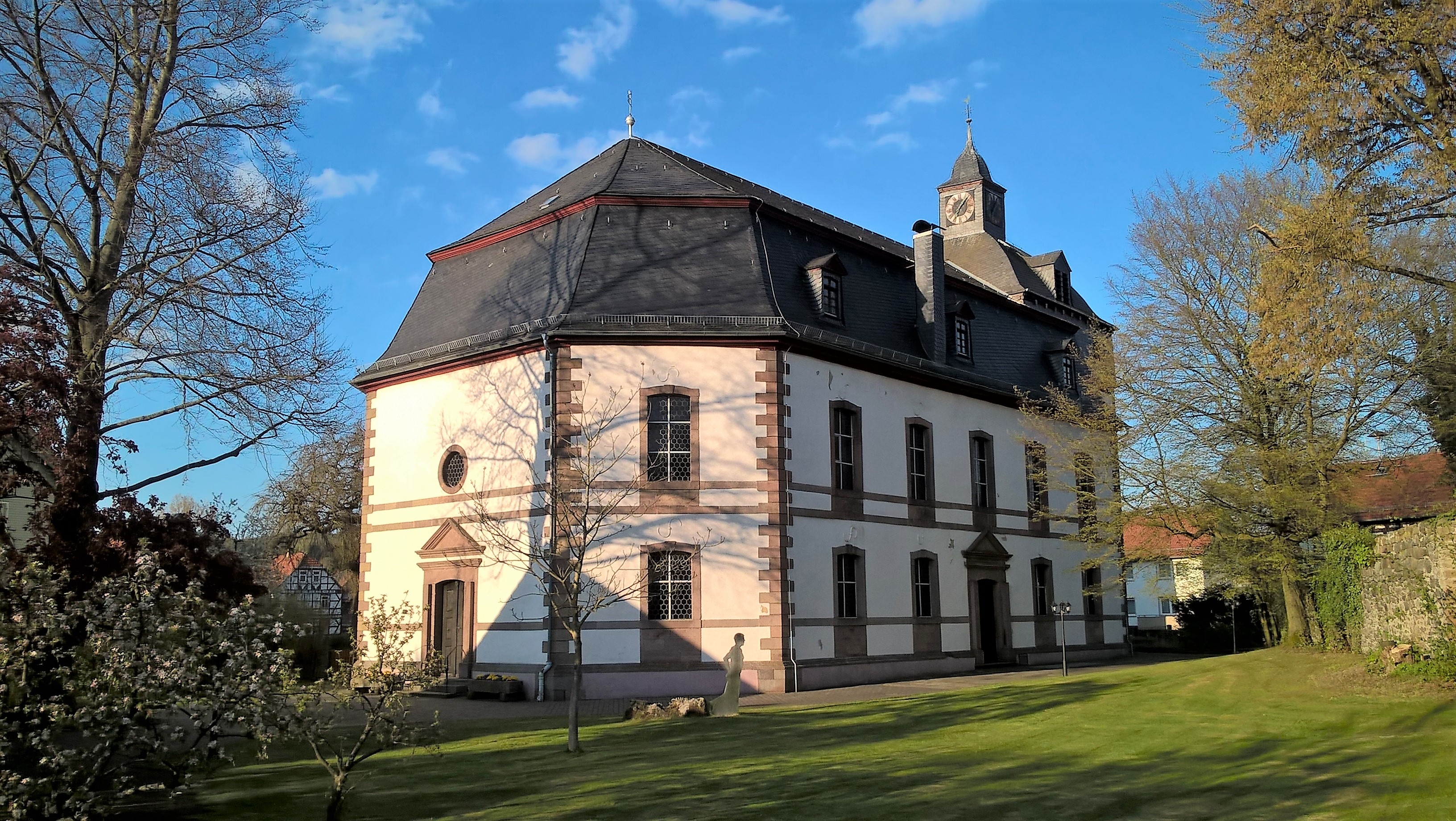 Evangelische Kirche Ober-Ohmen, Gemeinde Mücke, Vogelsbergkreis, Hessen, Deutschland